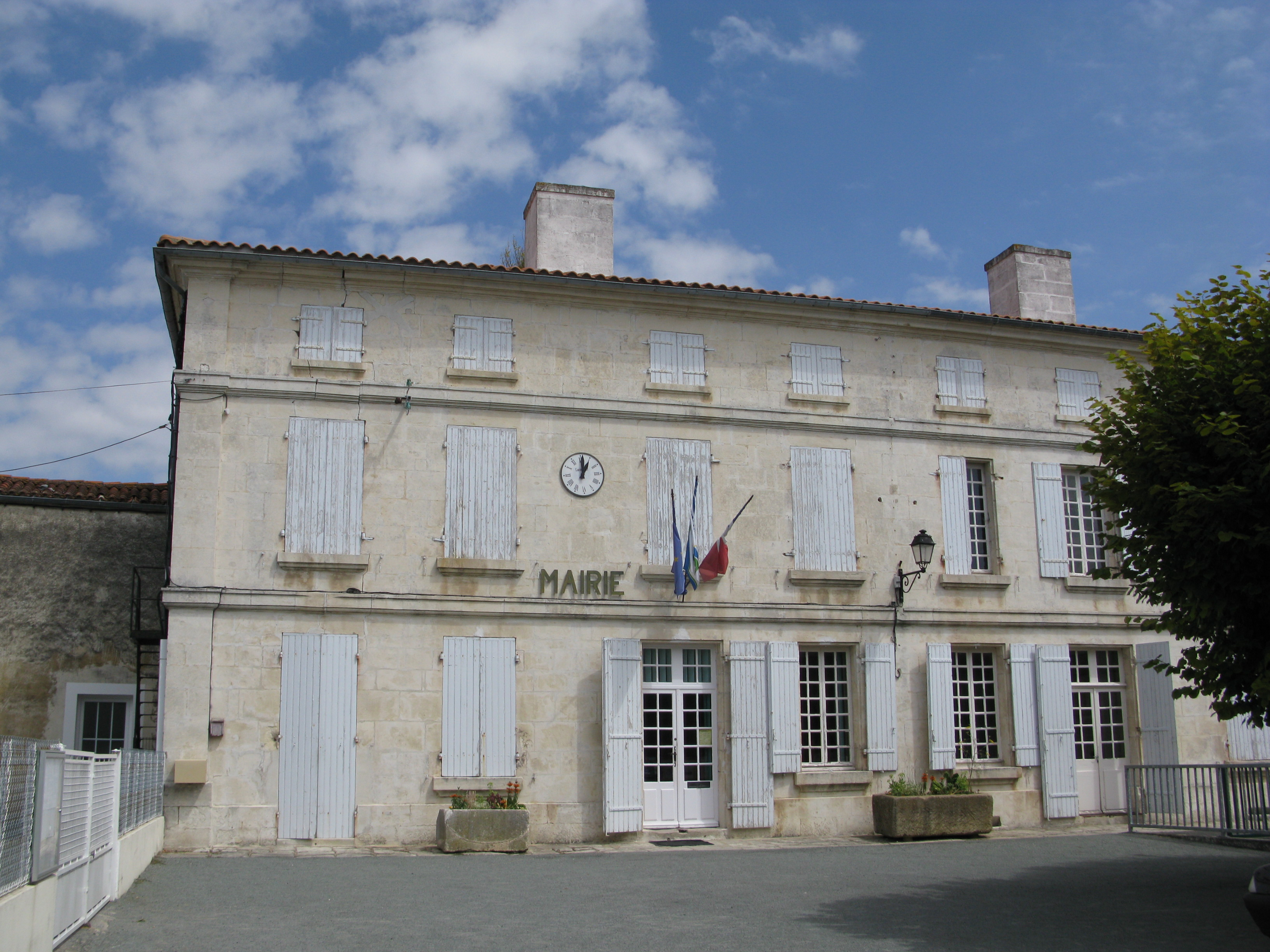 Mairie de Vandré